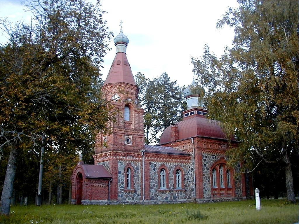 Veclaicenes baznīca 2000-09-13